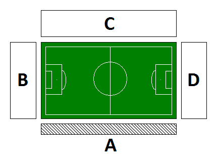 Схема стадиона СКБ-Банк Арена